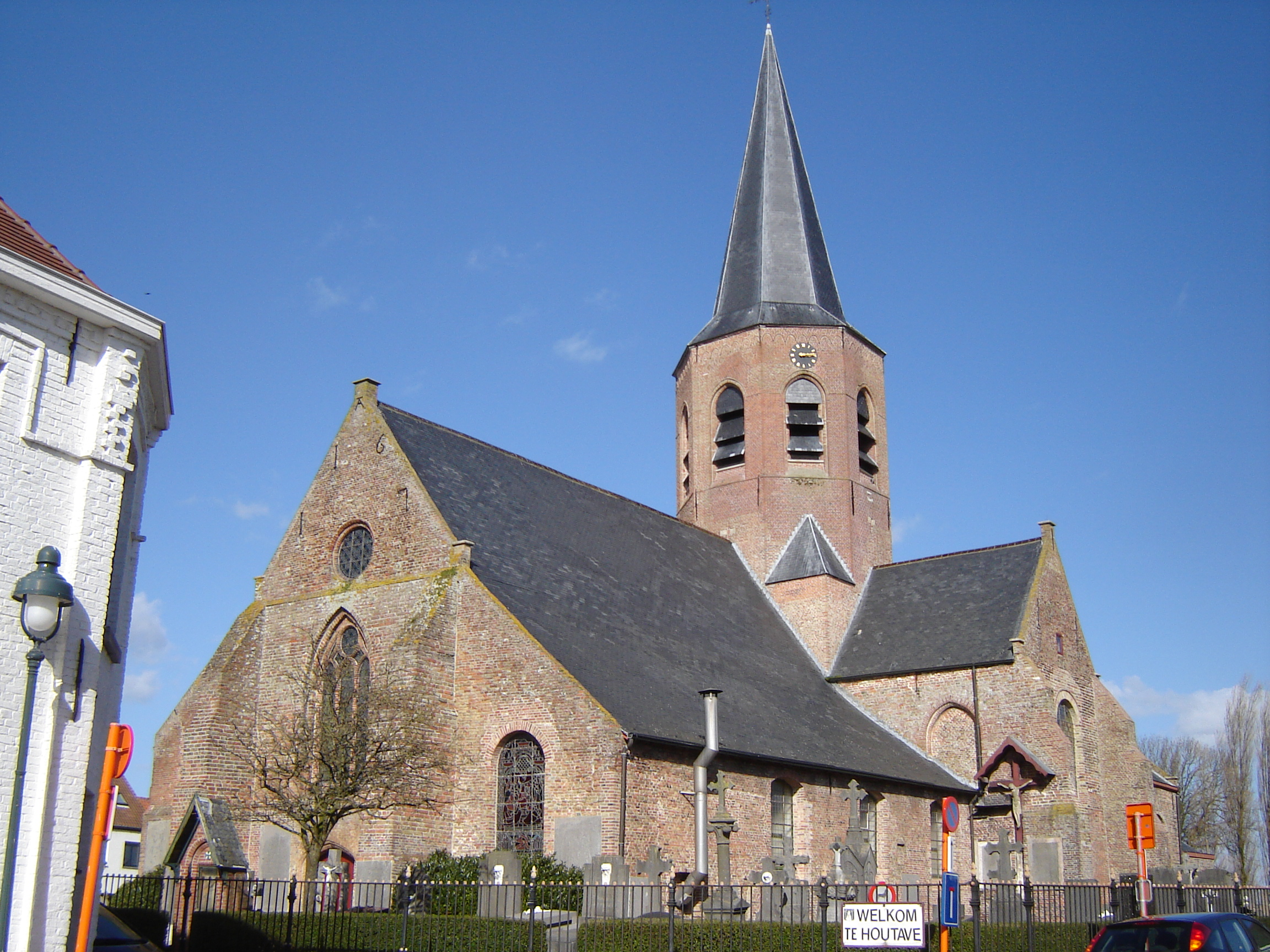 Sint-Bavo en Sint-Machutuskerk in Houtave Church of Saint Bavo and Saint Malo in Houtave, Zuienkerke, West Flanders, Belgium